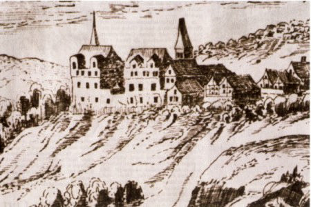 Wetterburg in Hessen, Germany